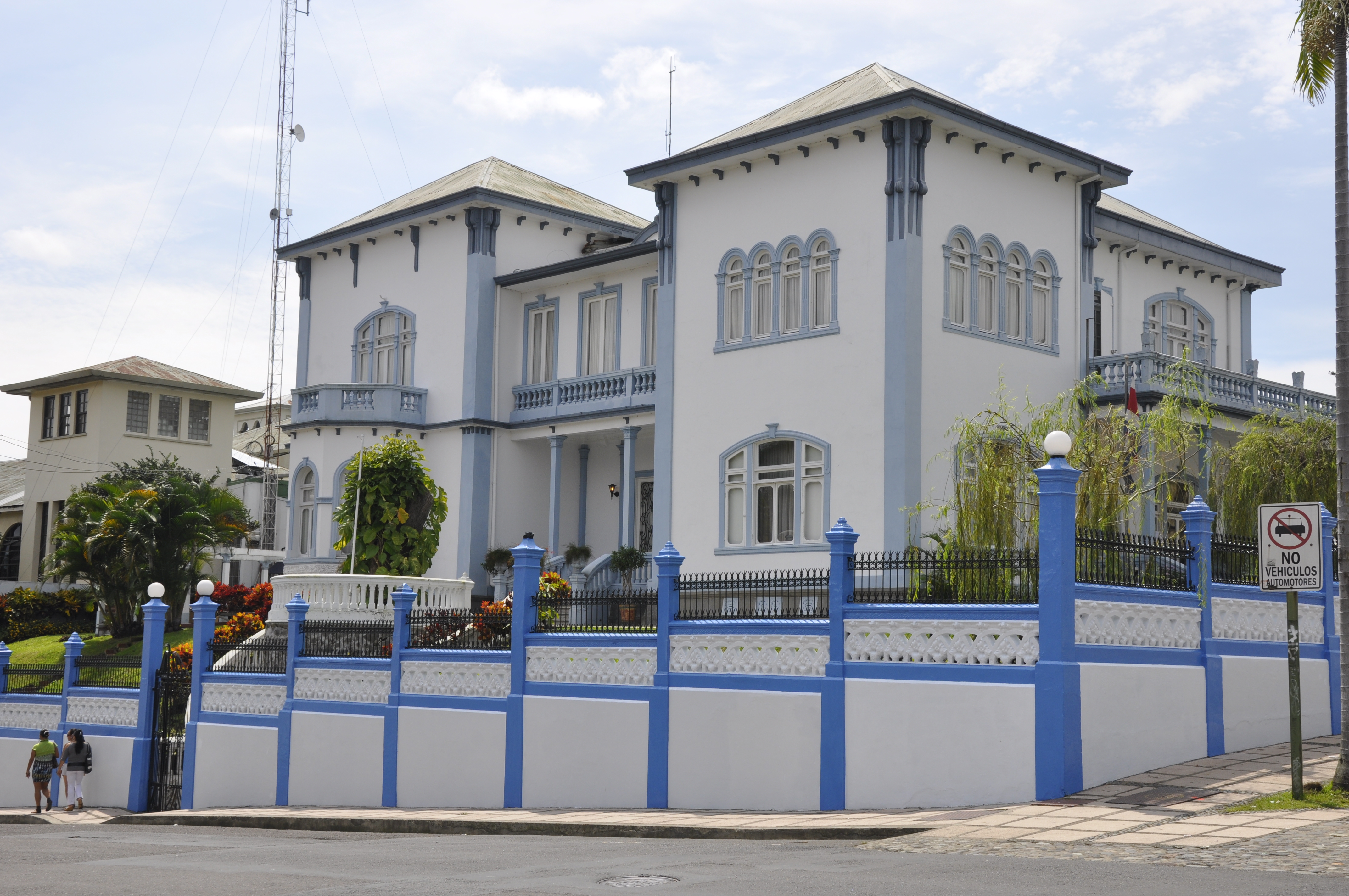 El Castillo Azul, edificio anexo de la Asamblea Legislativa, Cuesta de Moras, San José, Costa Rica.